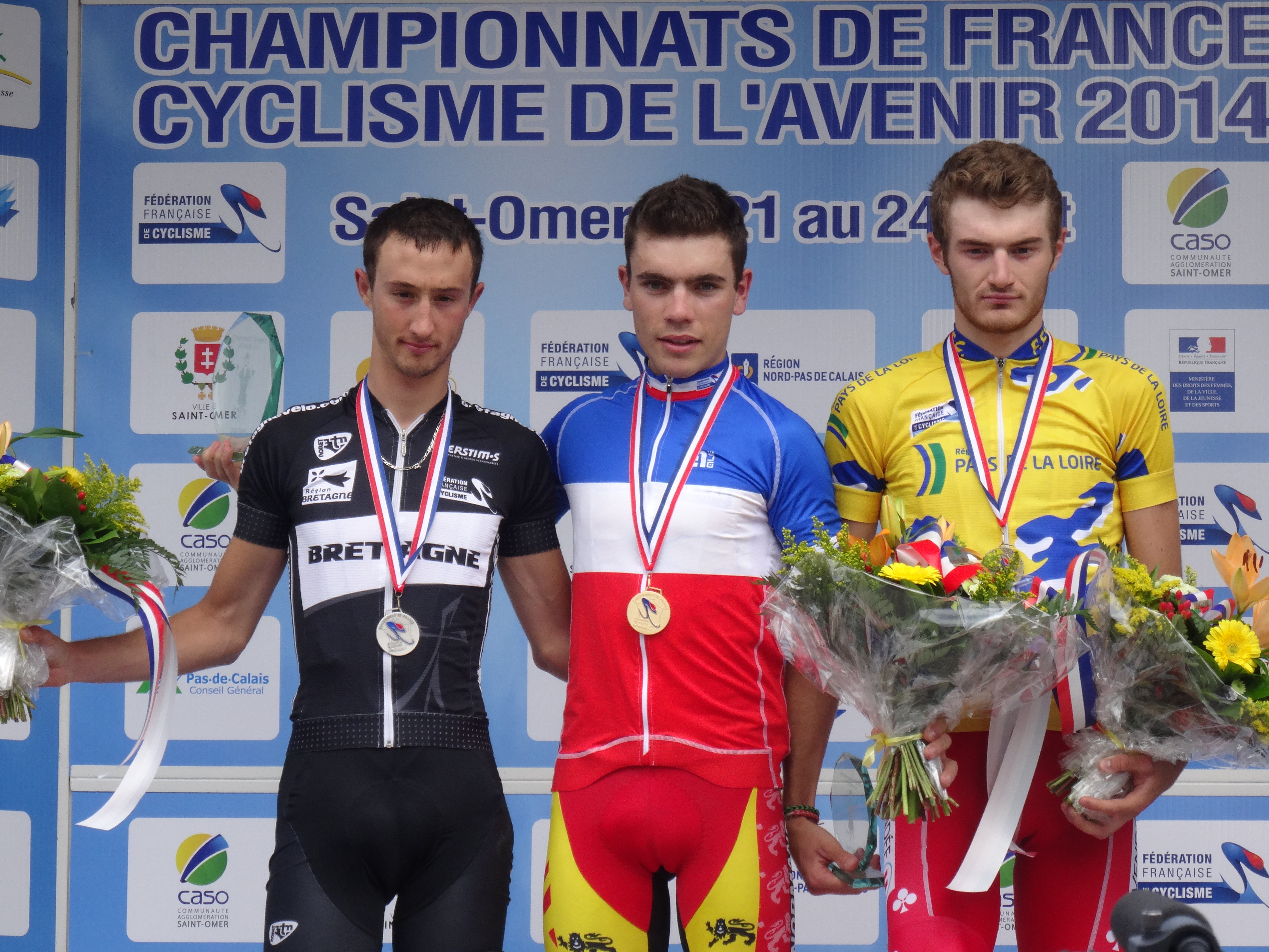 Reportage photographique réalisé le dimanche 24 août à l'occasion des Championnats de France de cyclisme sur route 2014 à Saint-Omer, Pas-de-Calais, Nord-Pas-de-Calais, France. Course en ligne, Espoirs hommes. Depicted people: David Cherbonnet, Jérémy Leveau and Guillaume Thévenot